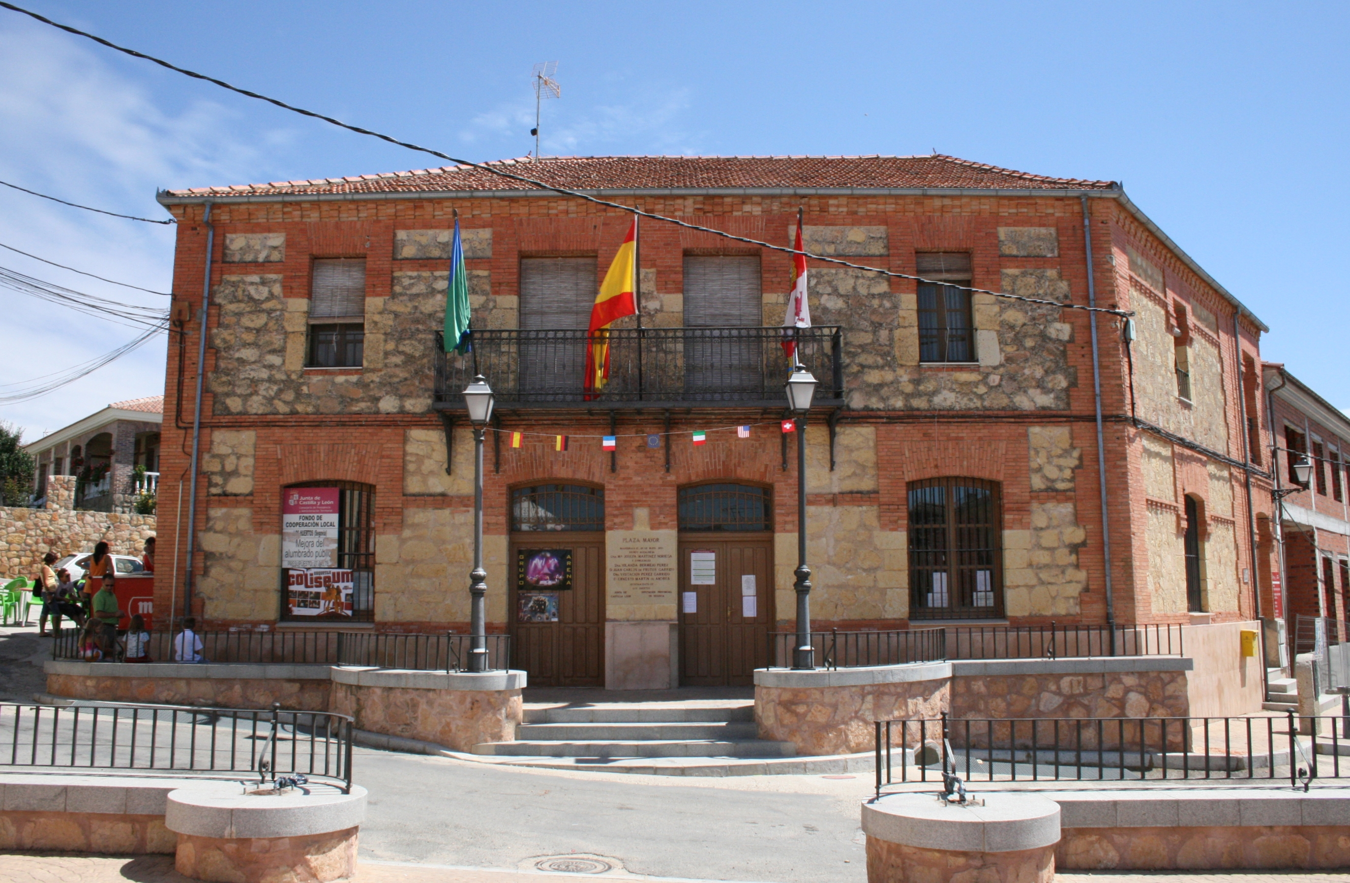 Ayuntamiento de Los Huertos (Segovia).